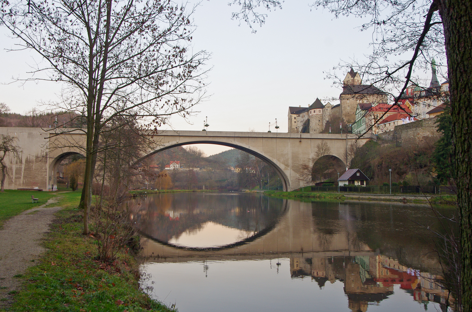 Ohře v Lokti, most na přijezdní silnici od Starého Sedla